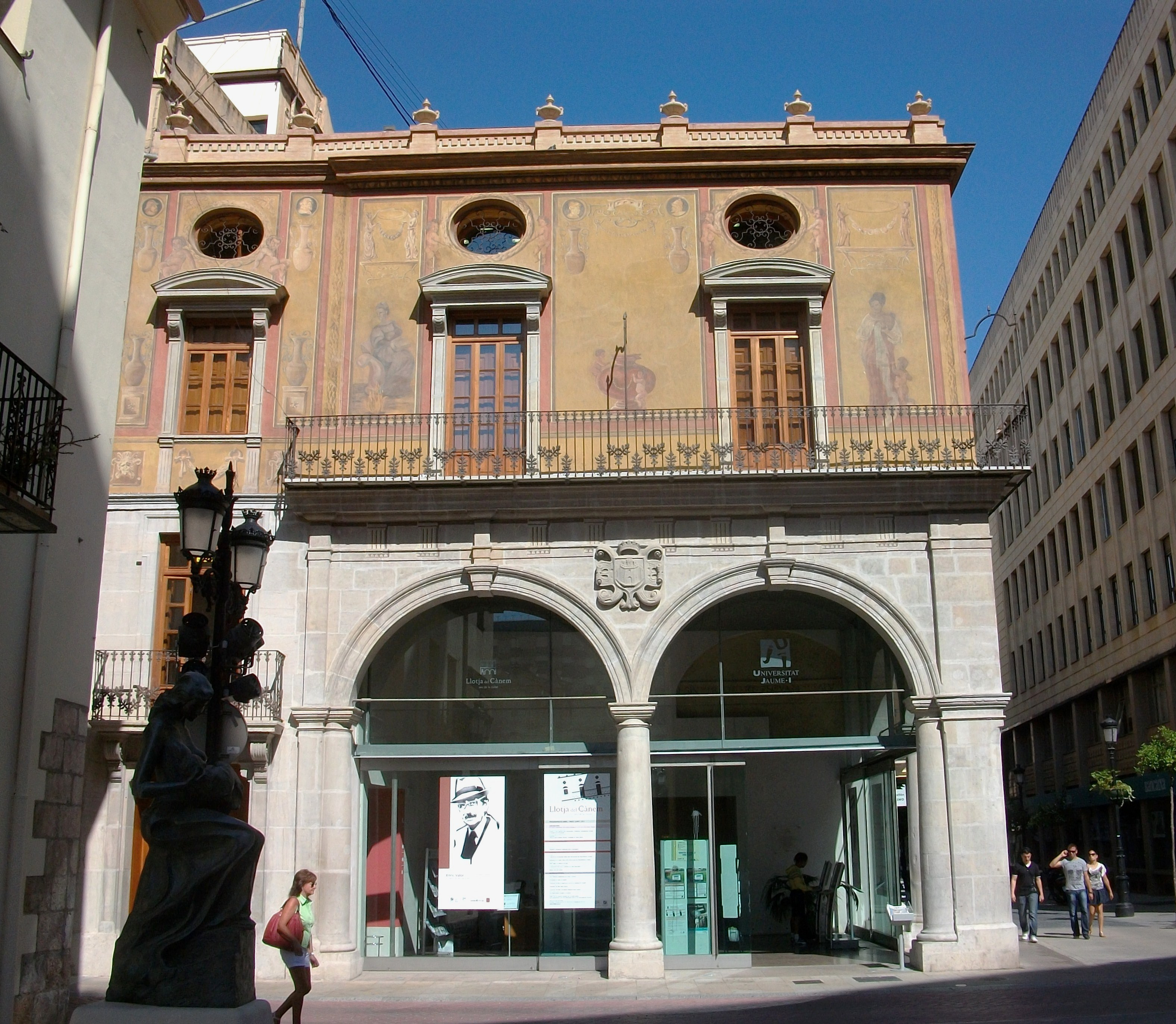 Llotja del Cànem de Castelló de la Plana.